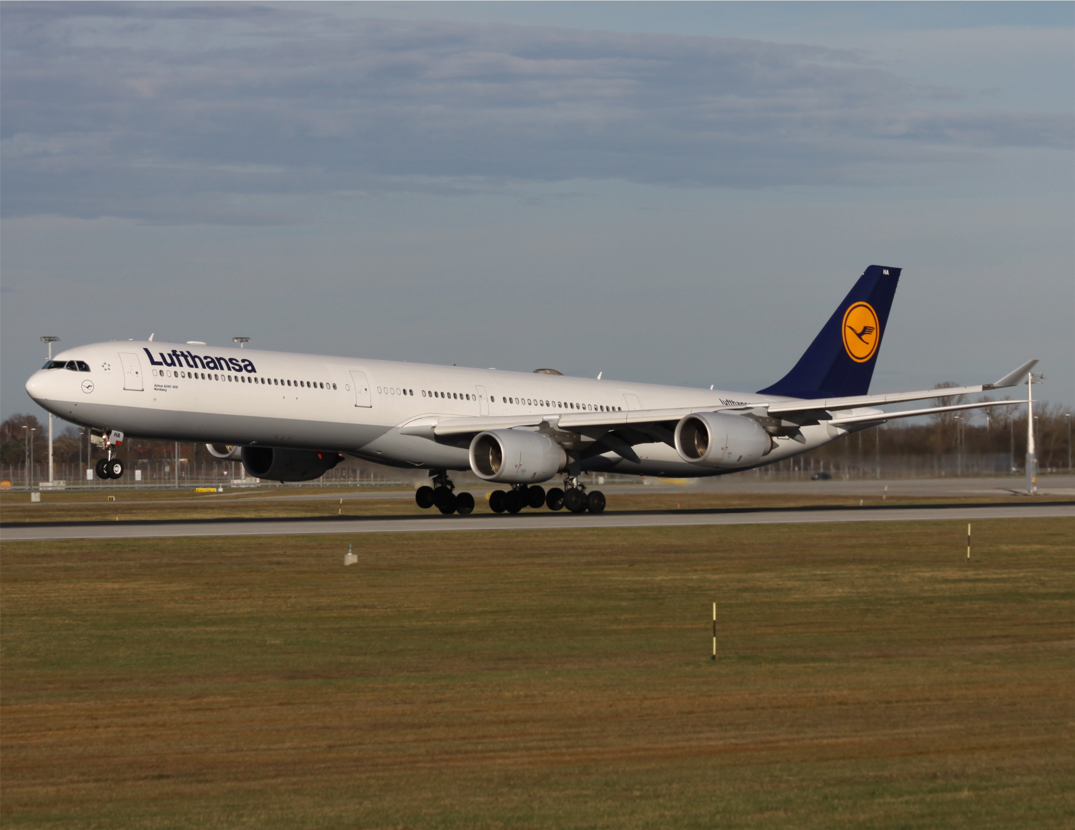 Lufthansa A340-600 (D-AIHA) named Nürnberg.